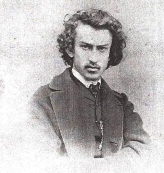 Фотография Н.Н. Миклухо-Маклая в студенческие годы